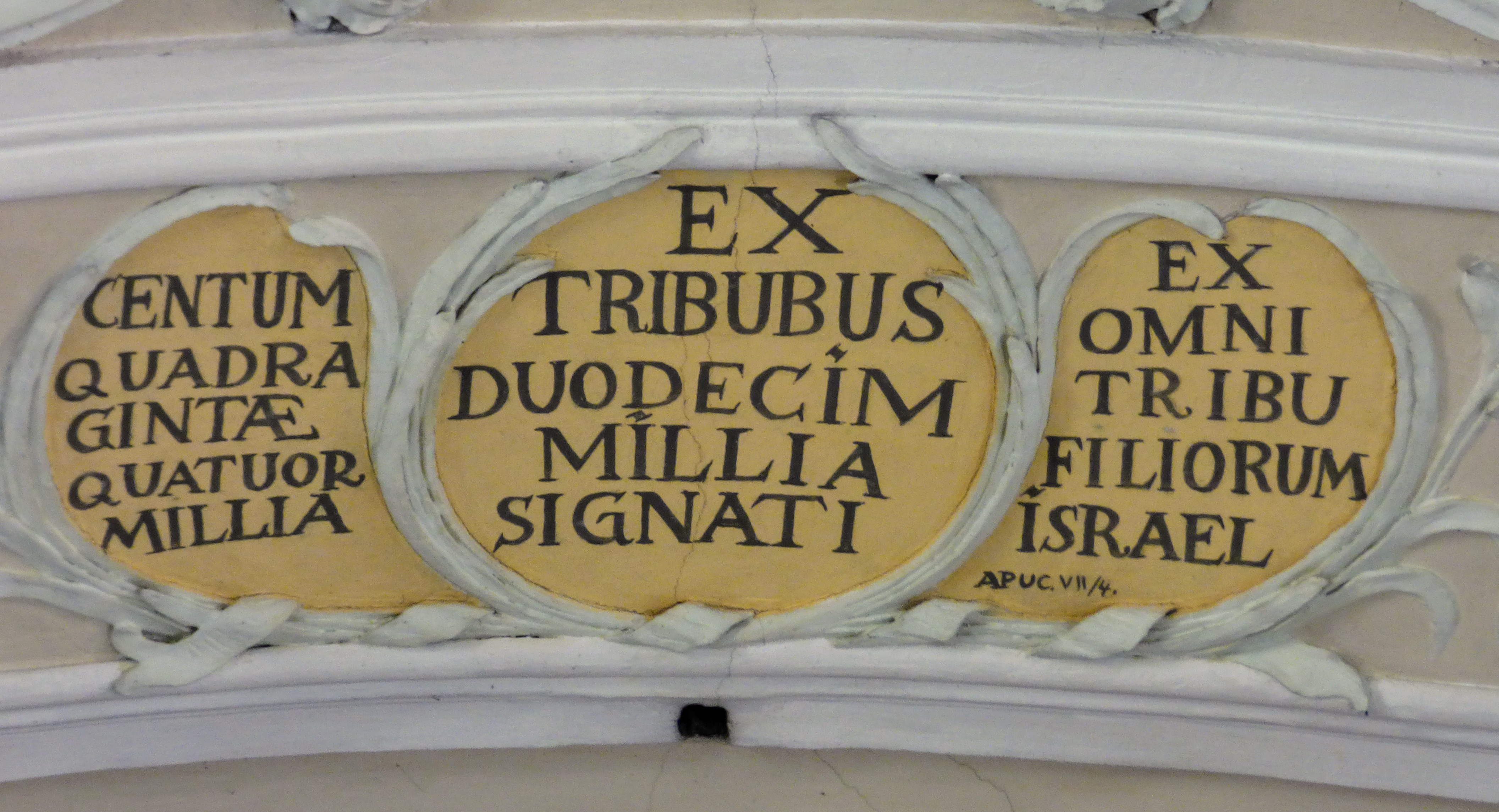 Lateinische Inschrift in Kath. Pfarrkirche Kreuzerhöhung, Laxenburg (Niederösterreich) aus Apokalypse 7,4. Deutsch etwa: "144.000 versiegelt aus allen Stämmen der Söhne Israels."